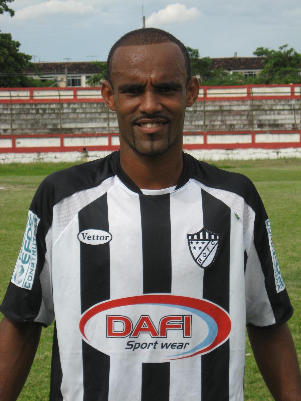 O artilheiro e destaque do time em 2009, o atacante Pimenta, do Rio das Ostras FC.